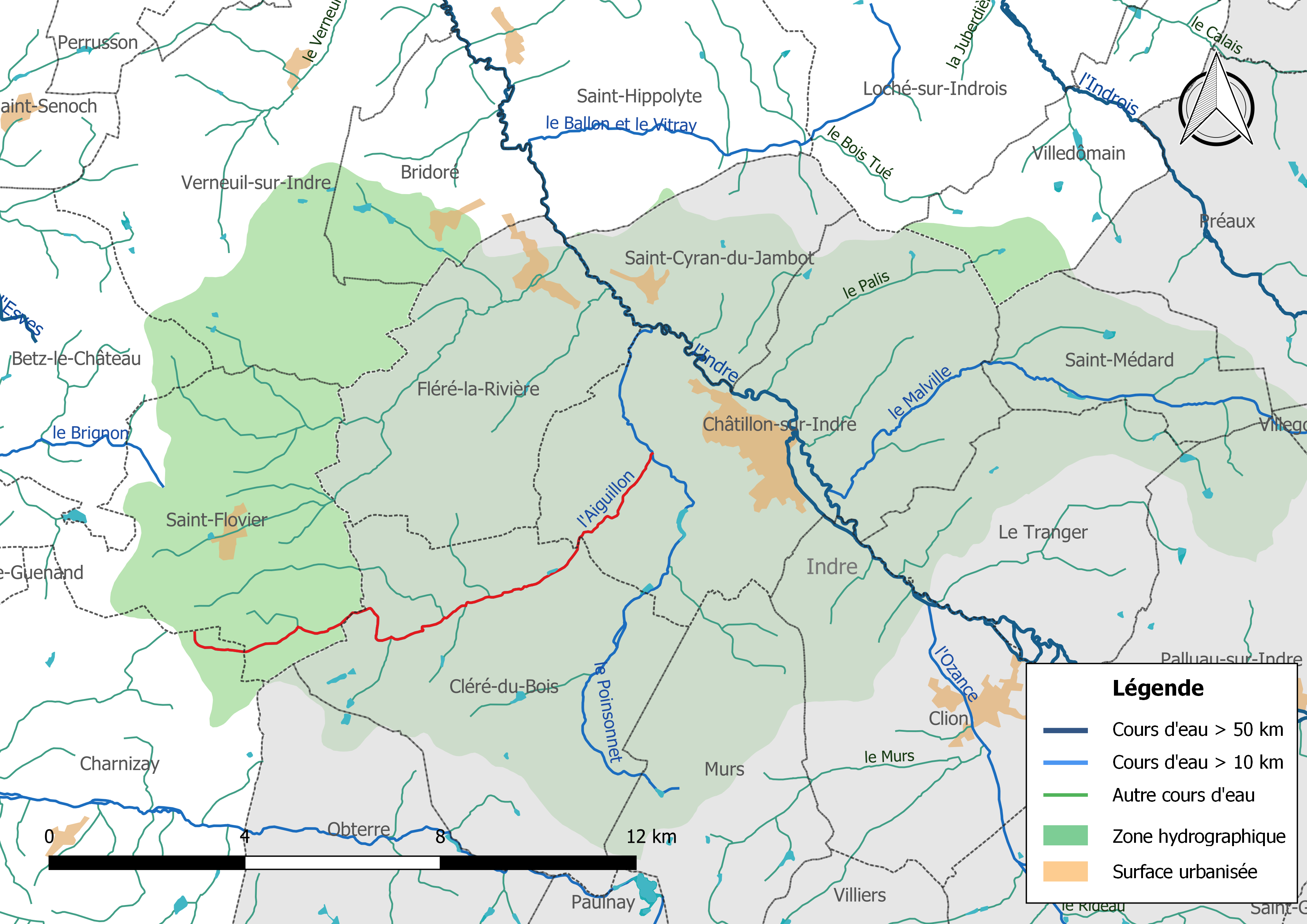 Carte du cours d'eau "l'Aiguillon " et de son bassin versant.